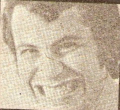 Andrés Cascioli director de Satiricón